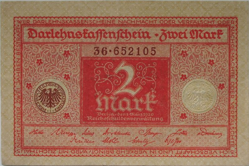 Darlehenskassenschein von 1920 zu 2 Mark; Selbst fotografiert am 9.3.2006